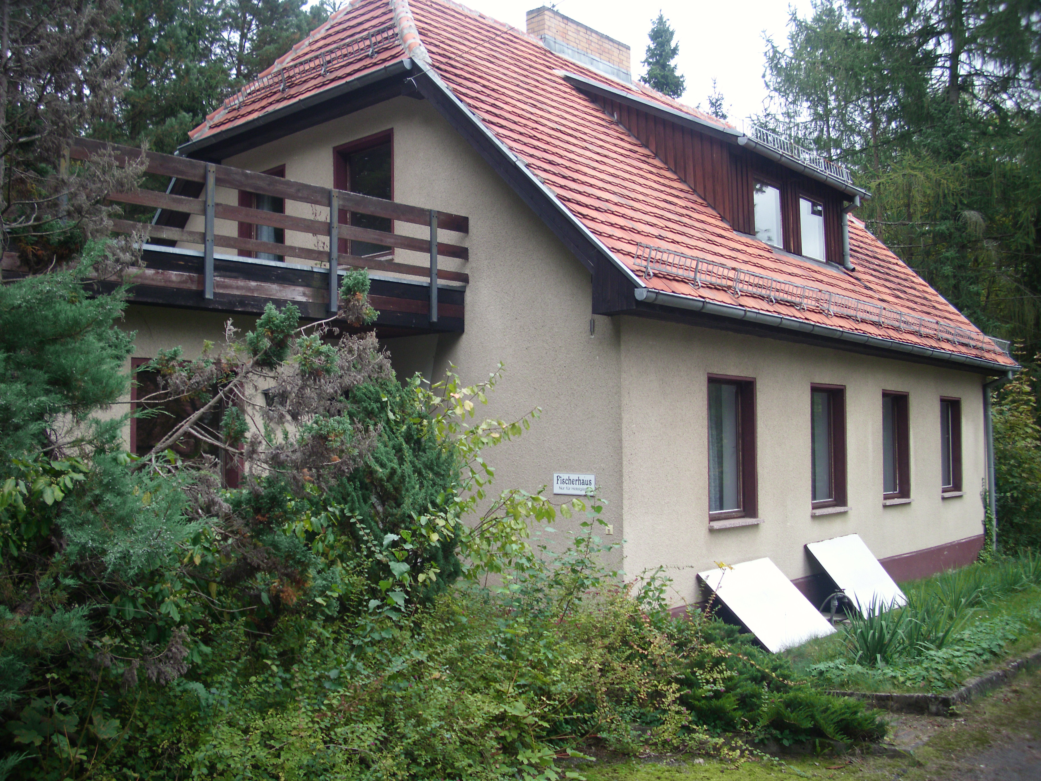 Fischerhaus Siehdichum, Brandenburg